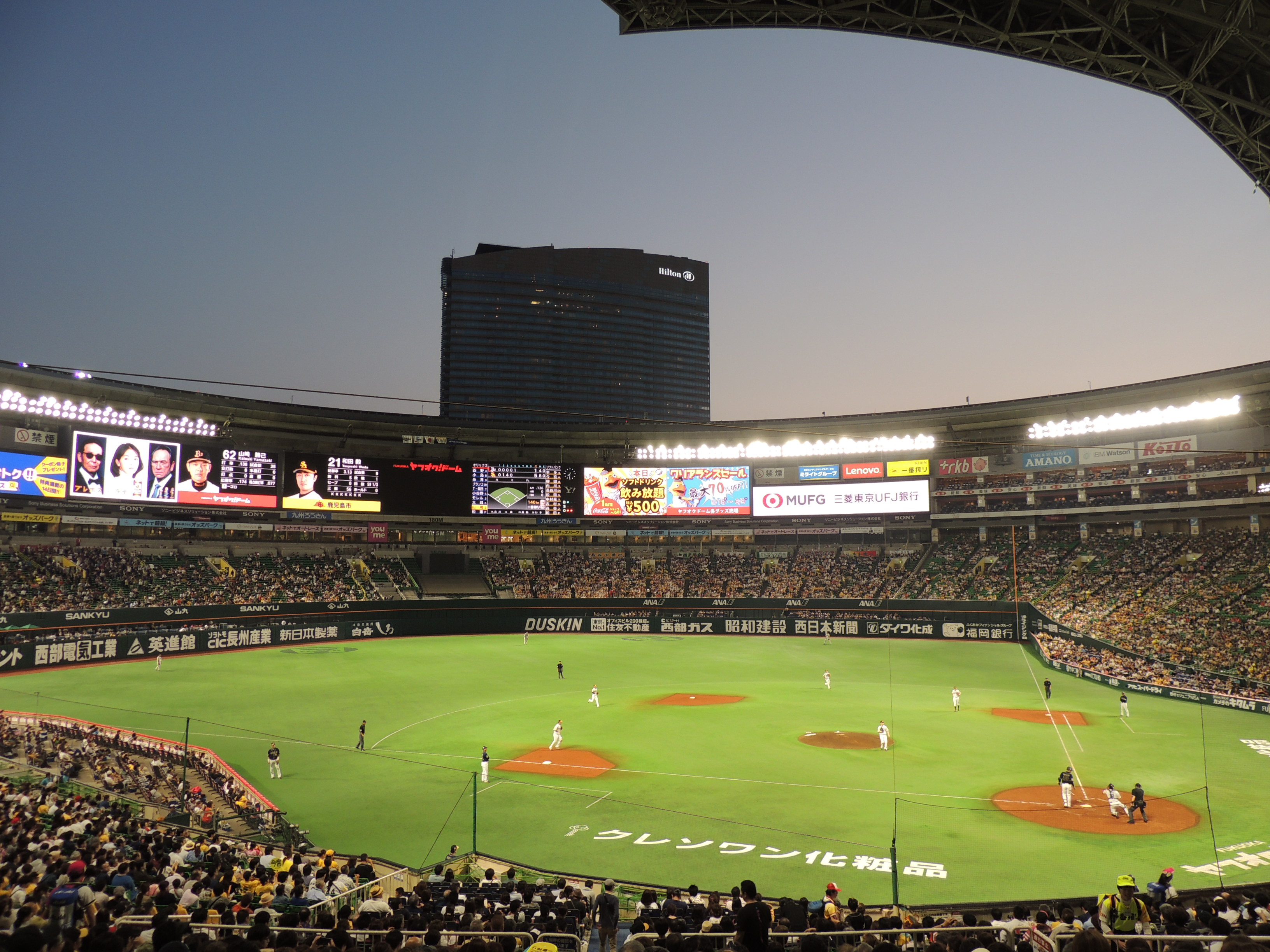 ヤフオク!ドームの夜間ルーフオープン。